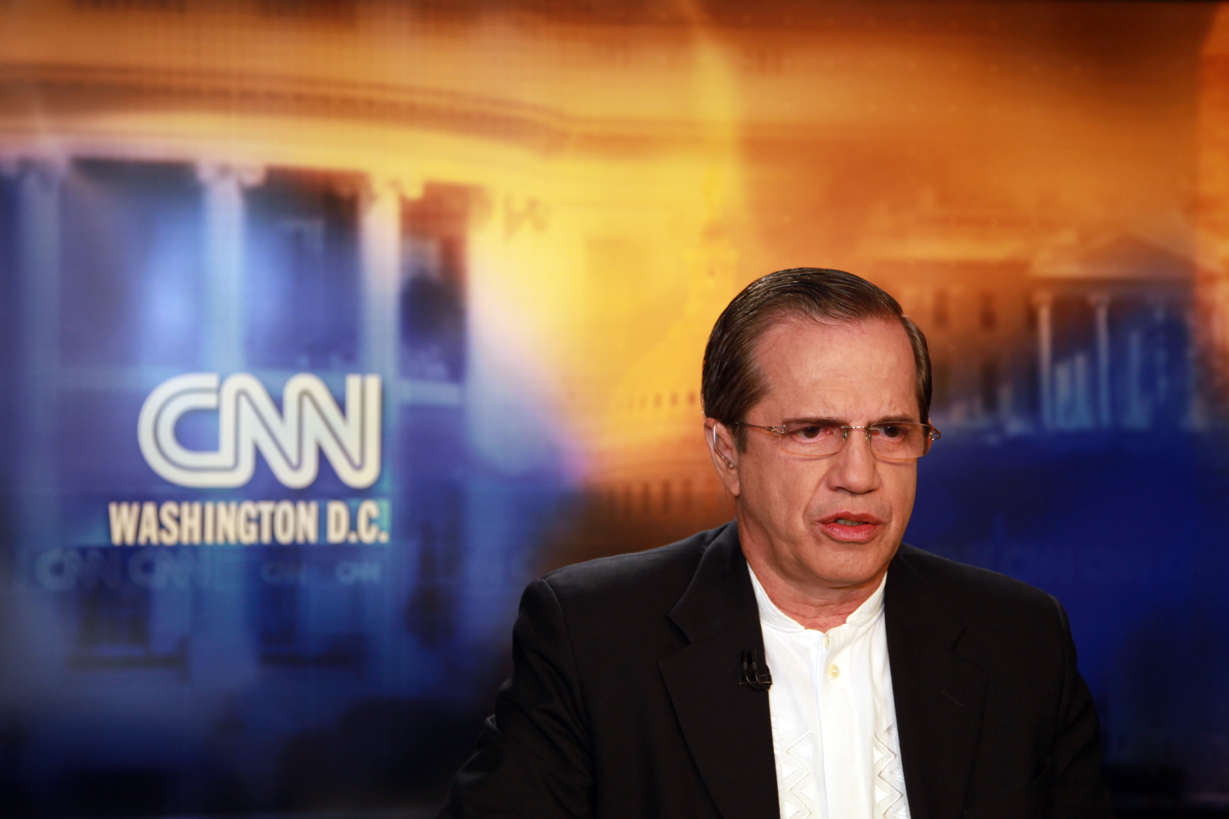 Washington D.C, 29 de Marzo 2012. El Canciller Ricardo Patiño visitó los estudios de CNN en Washington para ser entrevistado.